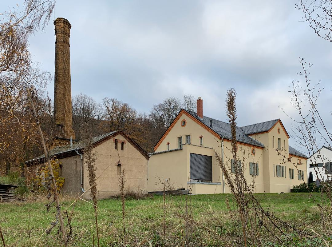 Gärtnerei nebst Heizhaus des Hohenhauses, nach teilweiser Sanierung, Mittlere Bergstraße 22